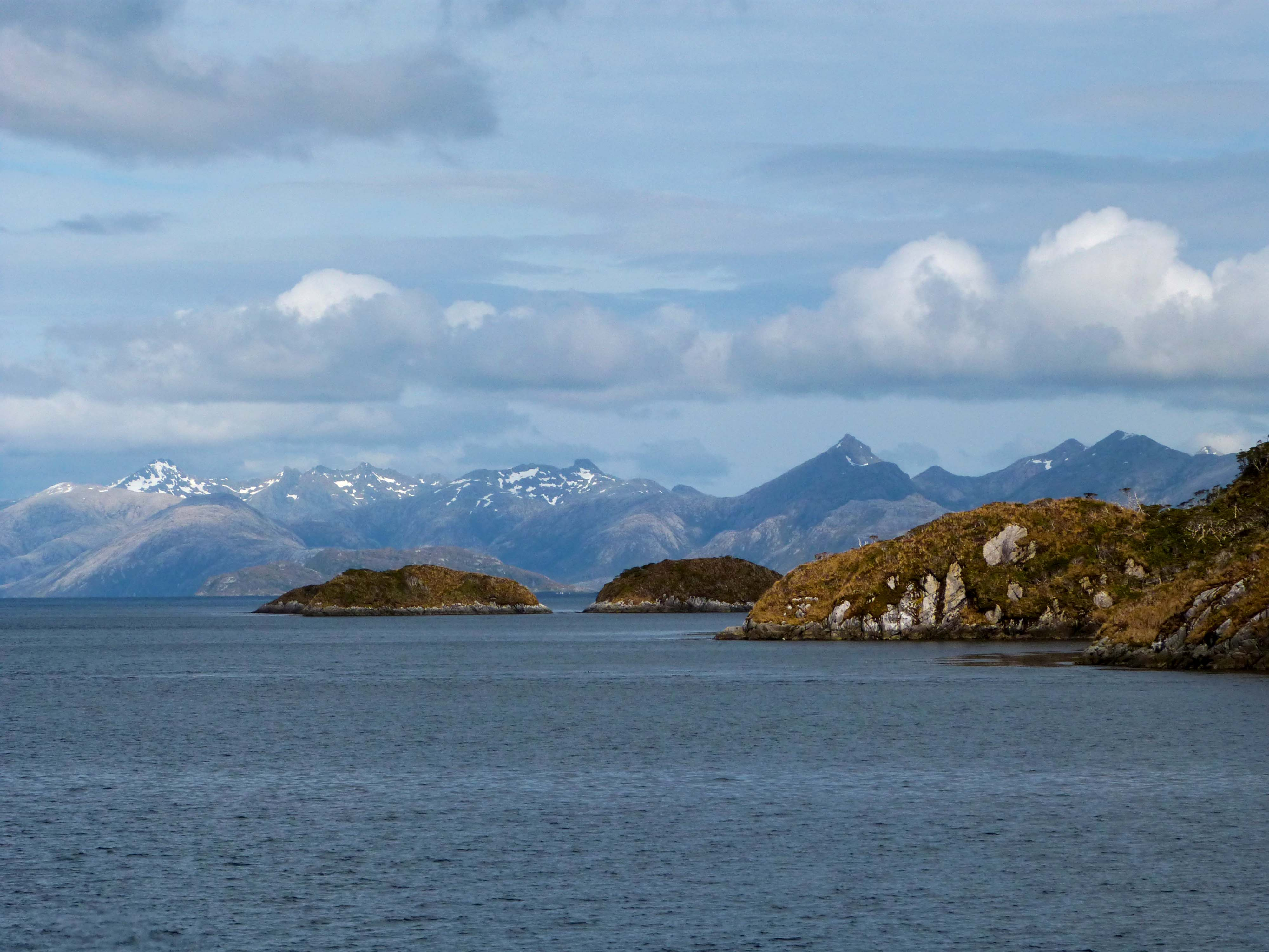 Vista des de el Canal de Beagle